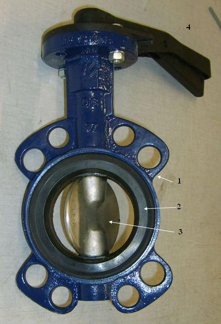 picture of butterfly valve